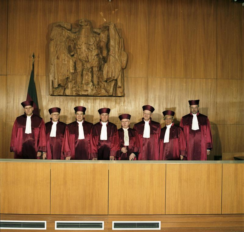 18.12.1989 Bundesverfassungsgericht Karlsruhe II. Senat in alter Zusammensetzung (bis 1.12.1989) v.li. Dr. Everhardt Franßen, Konrad Kruis, Prof. Dr.Dr. Ernst Wolfgang Böckenförde, Vizepräsident Dr. Ernst Gottfried Mahrenholz, Ernst Träger, Prof. Dr. Hans Hugo Klein, Dr. Karin Graßhof, Dr. Paul Kirchhof